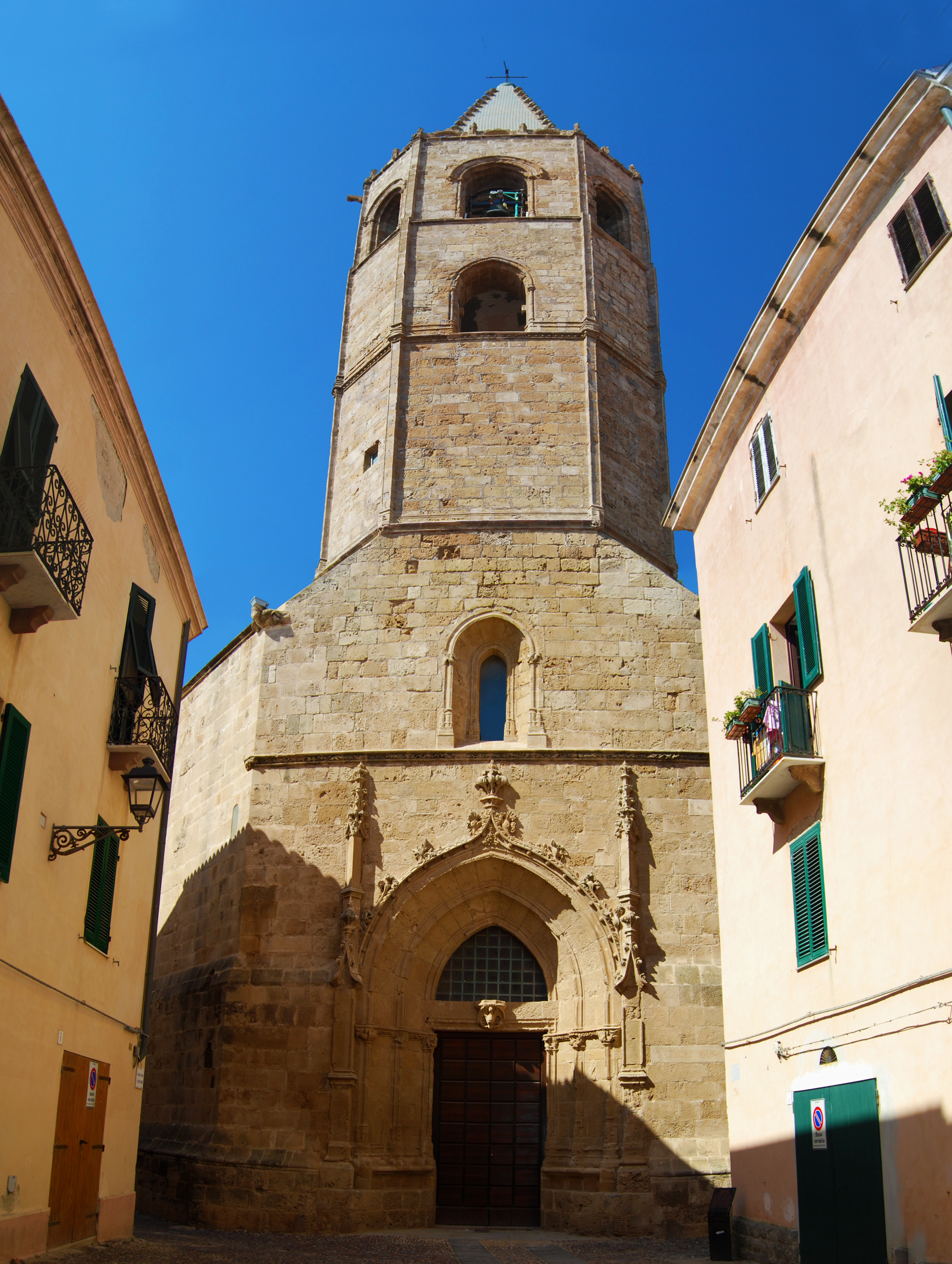 Alghero